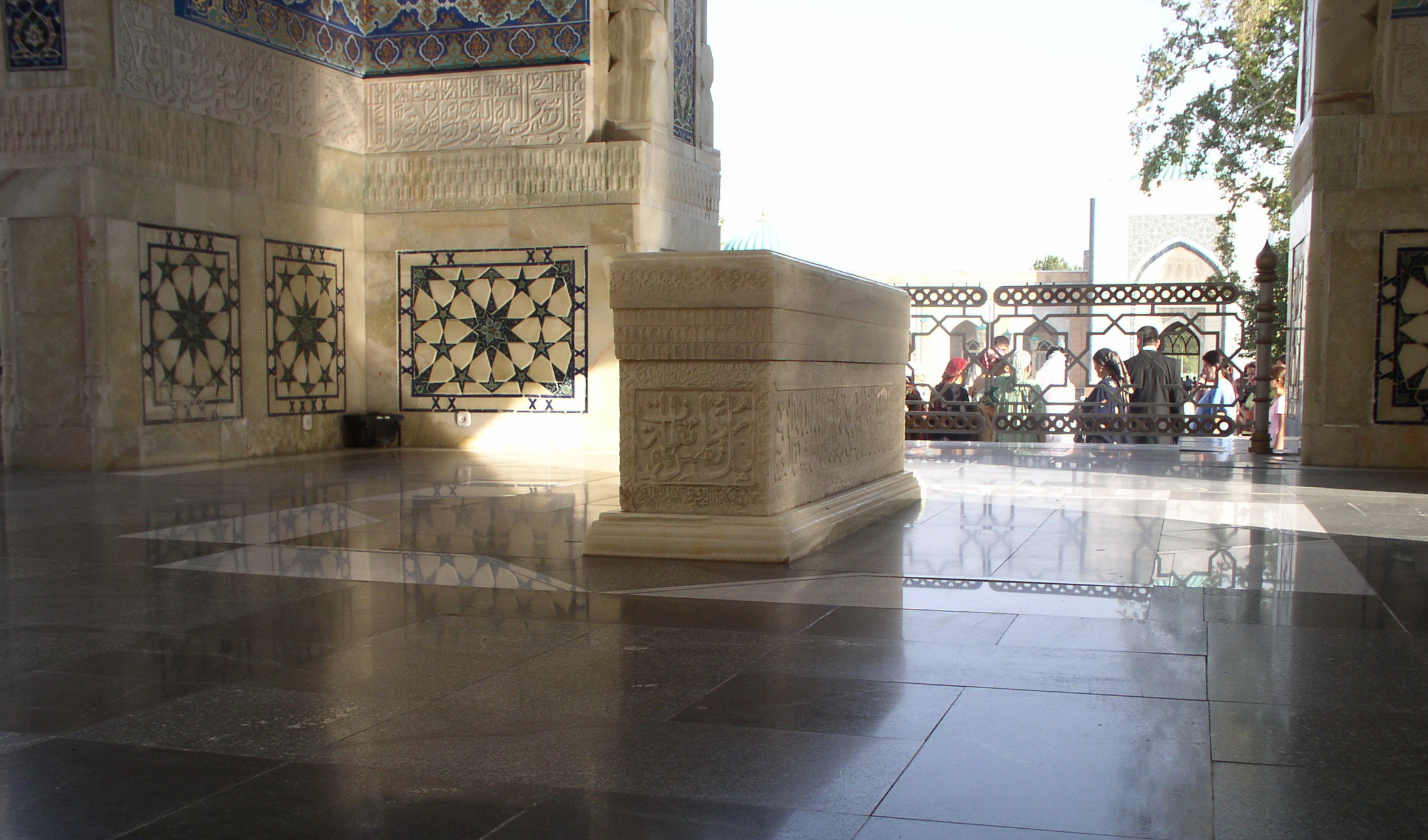 Mausoleum erected over Muhammad al-Bukhari's grave. Samarkand, Uzbekistan